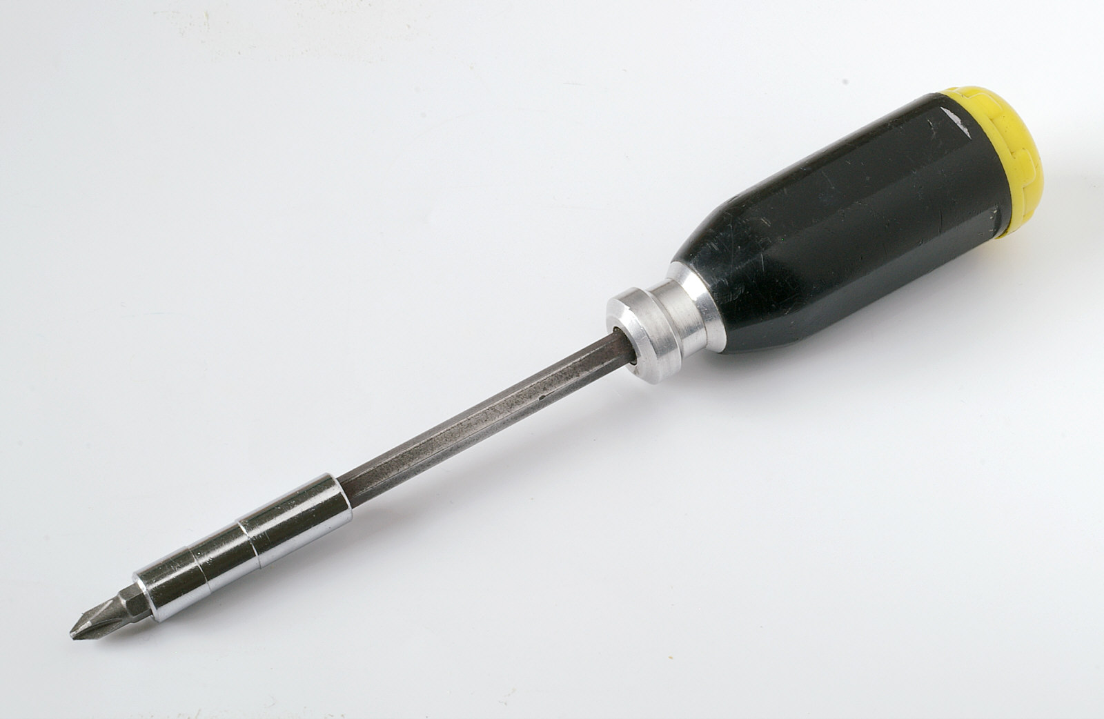 Schraubendreher mit Magnethalter für Bits. Im hohlen Griff Aufbewahrungsmöglichkeit für weitere Schraubereinsätze